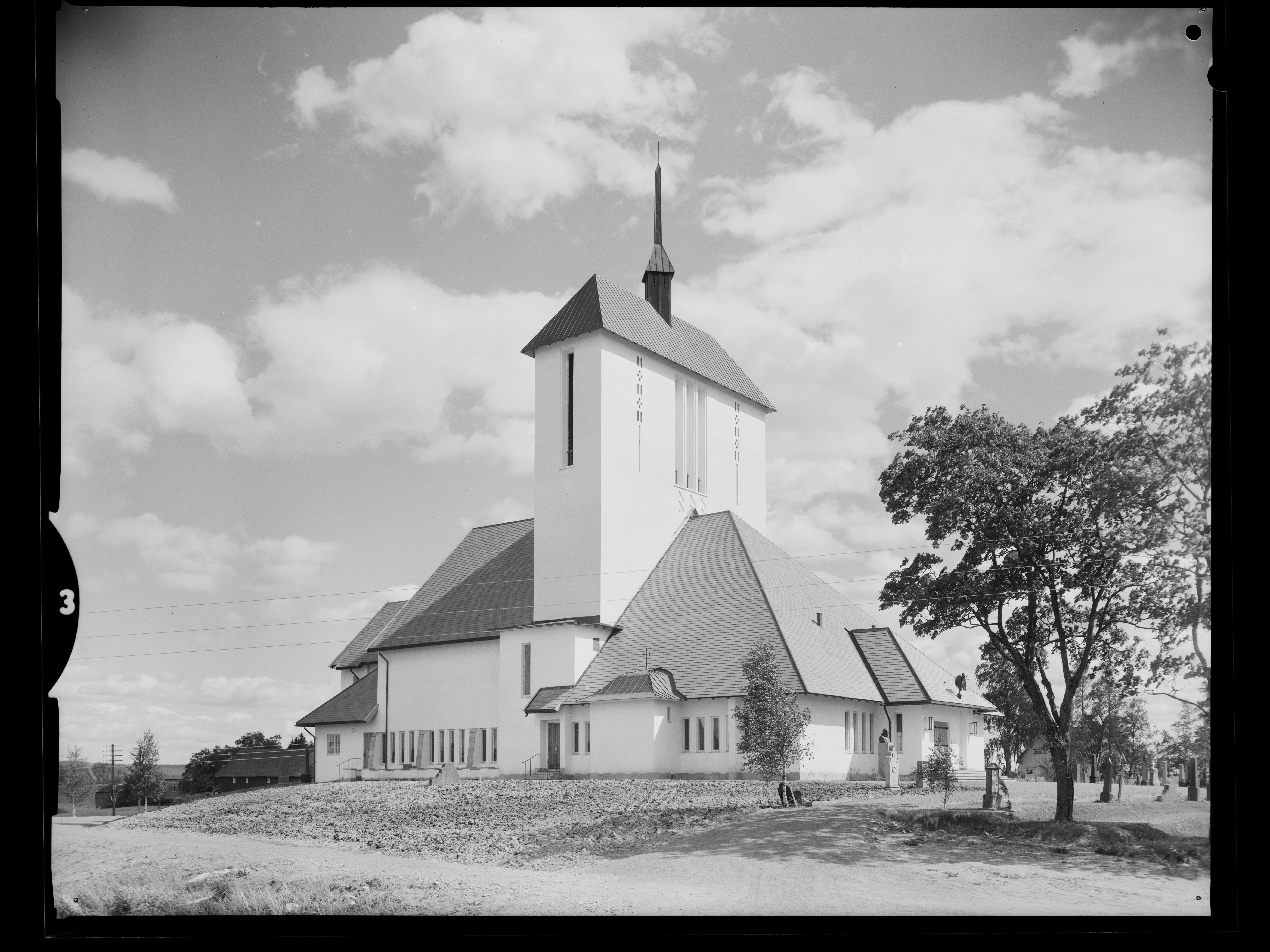 Bildet er hentet fra Nasjonalbibliotekets bildesamling. Anmerkninger til bildet var: Fotograf: ukjent Ullensaker, Ullensaker, Akershus